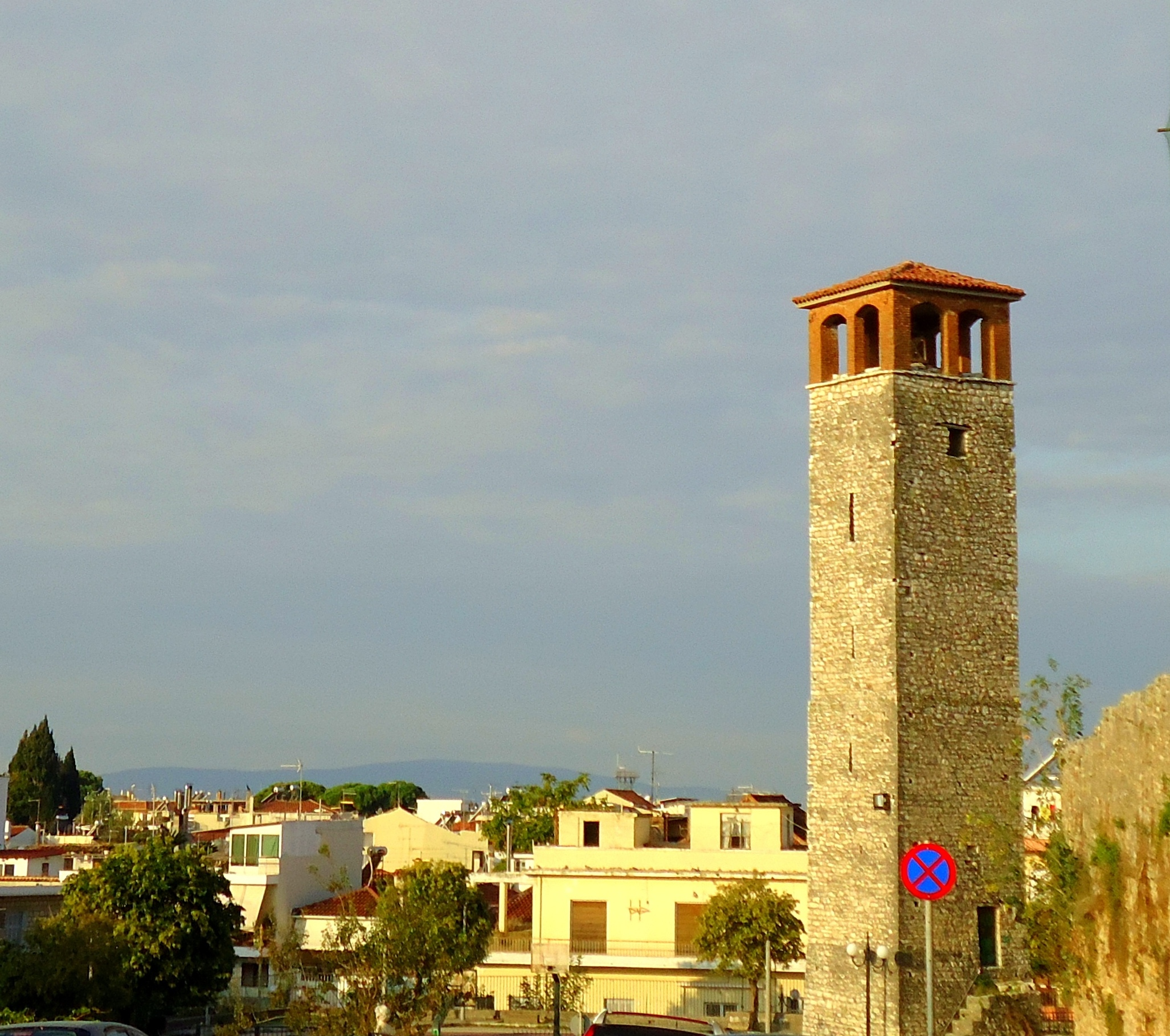 Πύργος ρολογιού, Άρτα, Ελλάδα.